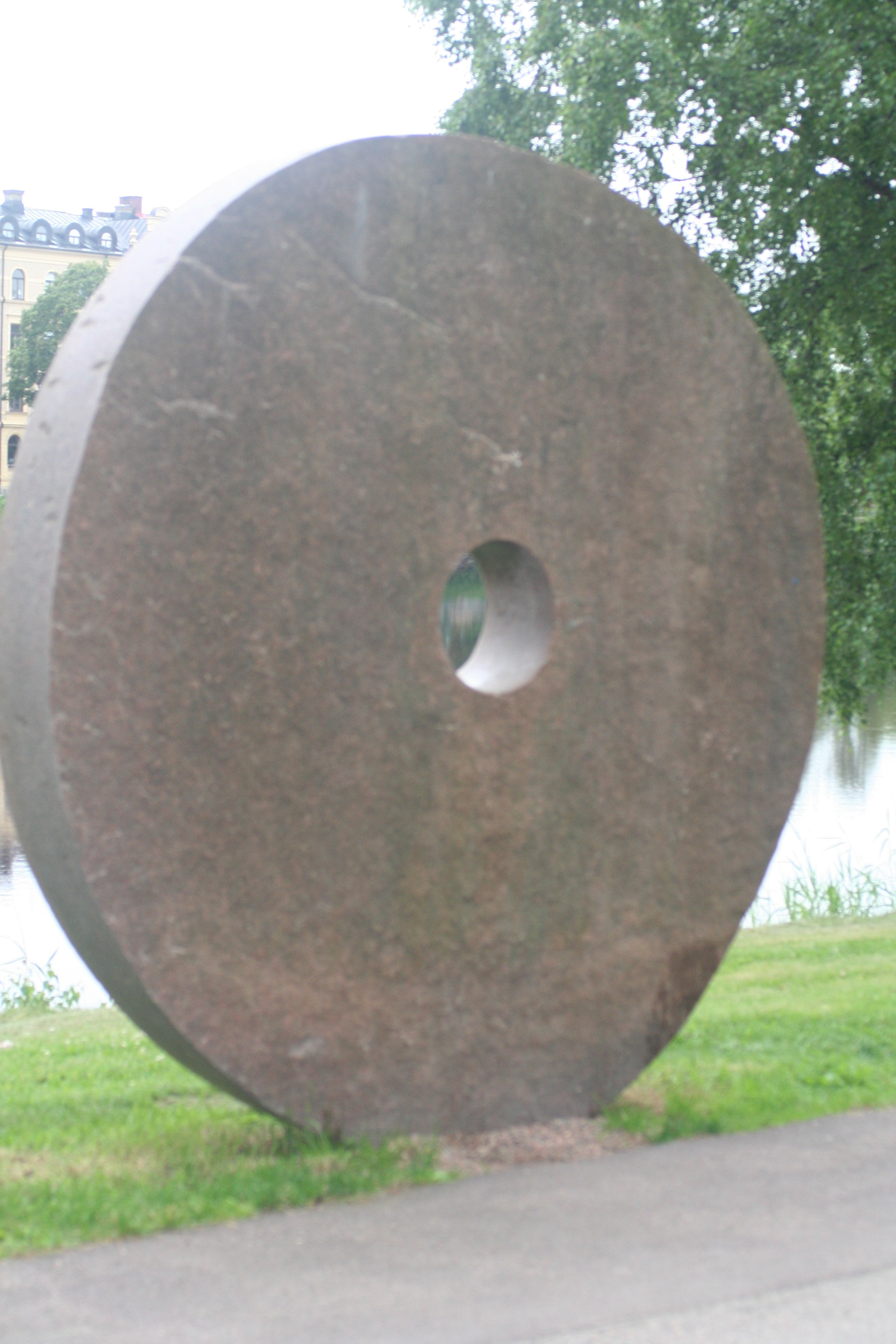 Kort på skulpturen nära Klarälven i centrala Karlstad